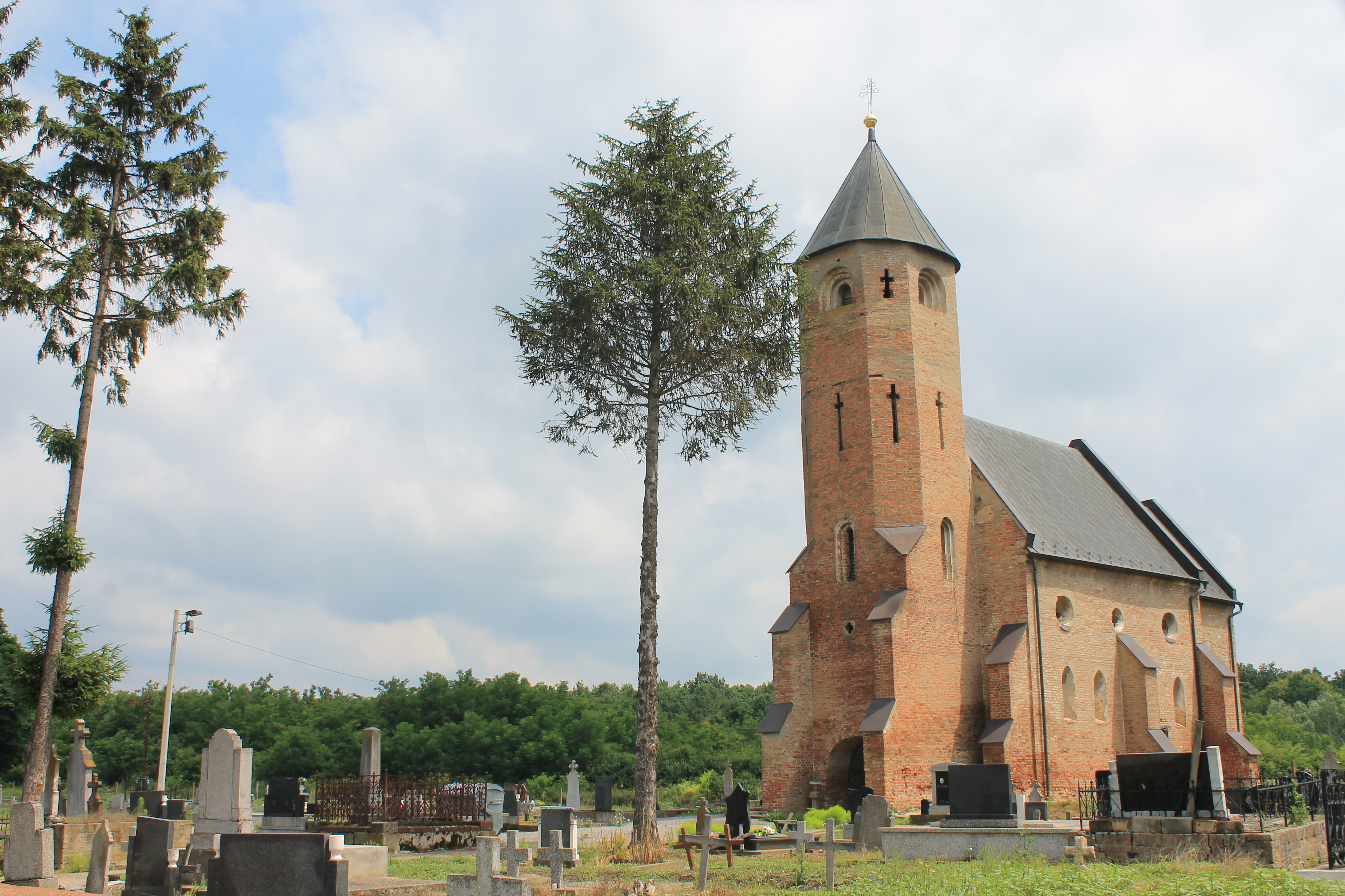 Rimokatolička crkva Sv. Marije u Moroviću